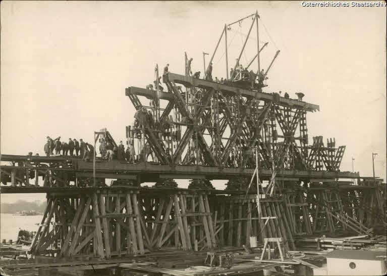 AT-OeStA/KA BS I WK Fronten Serbien, 3226 Belgrad Savebrücke, Montage der Roth Wagner-Brücke (94.5 m Feld auf 4 Montierungsgliedern, 8 Schiffe), 1915.12.19 (Einzelstück (Aktenstück, Bild, Karte, Urkunde))